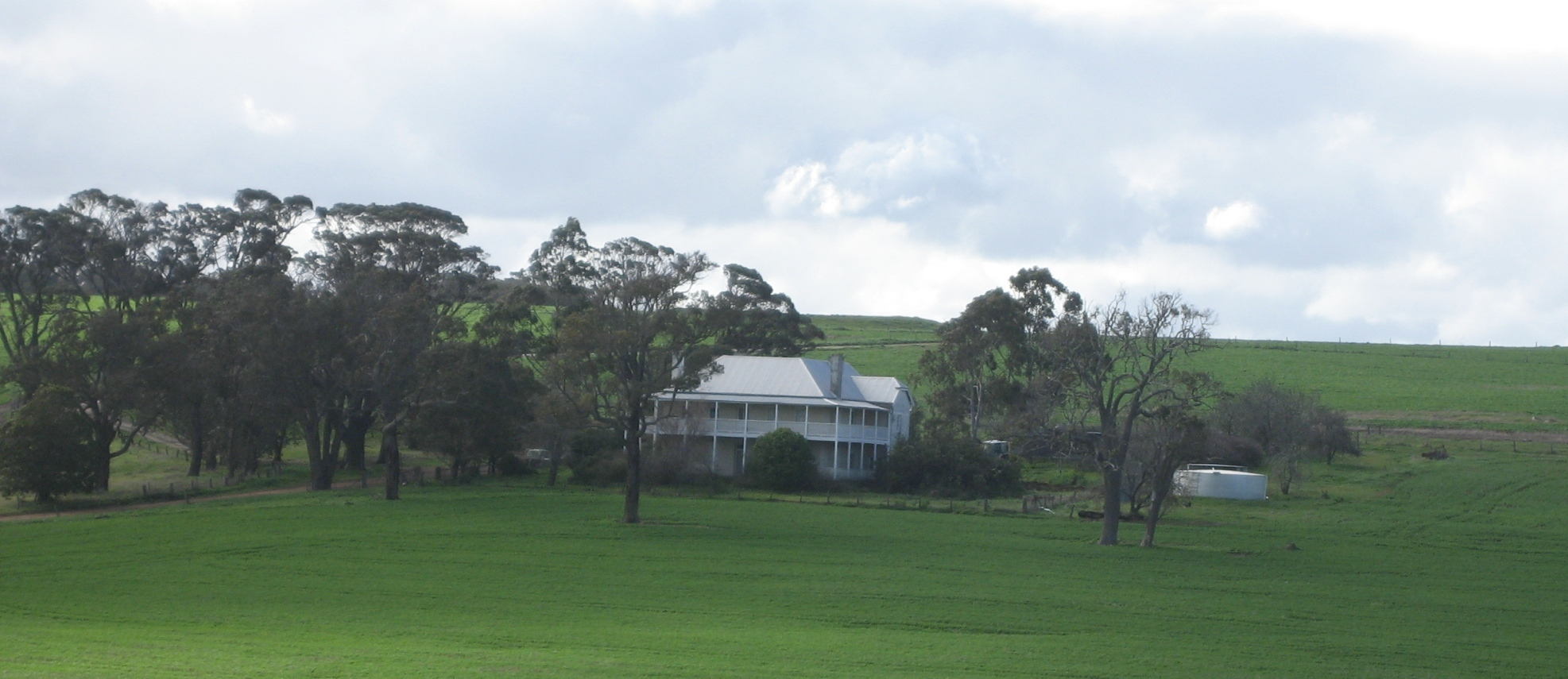 Hassell homestead, Kendenup, Western Australia